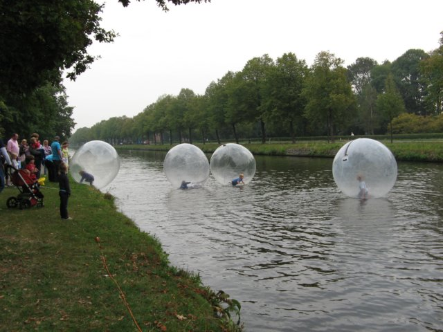 Kinderen in een 'Aquabubble' op het water